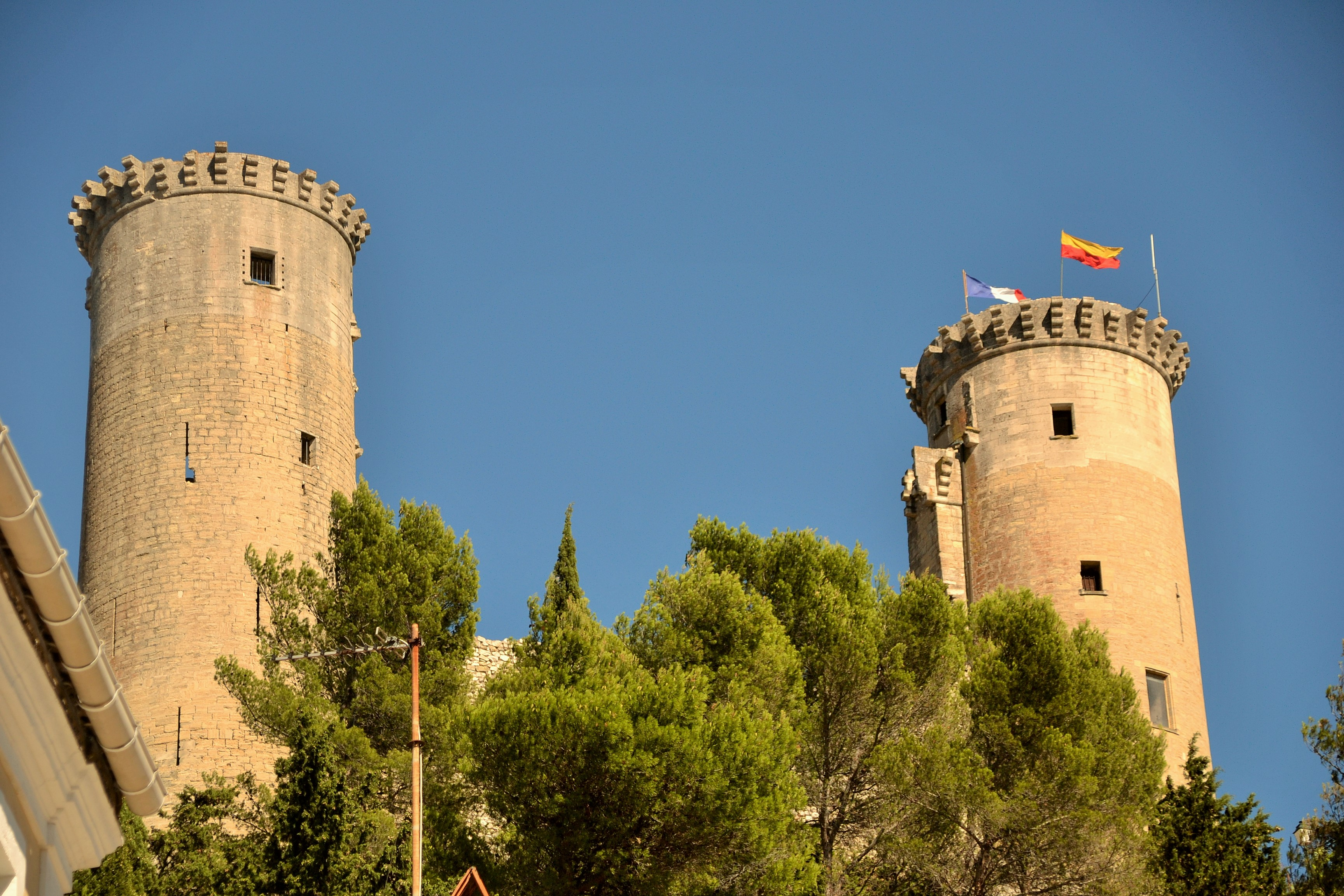 Vue du château des comtes de Provence à Châteaurenard (Bouches-du-Rhone).